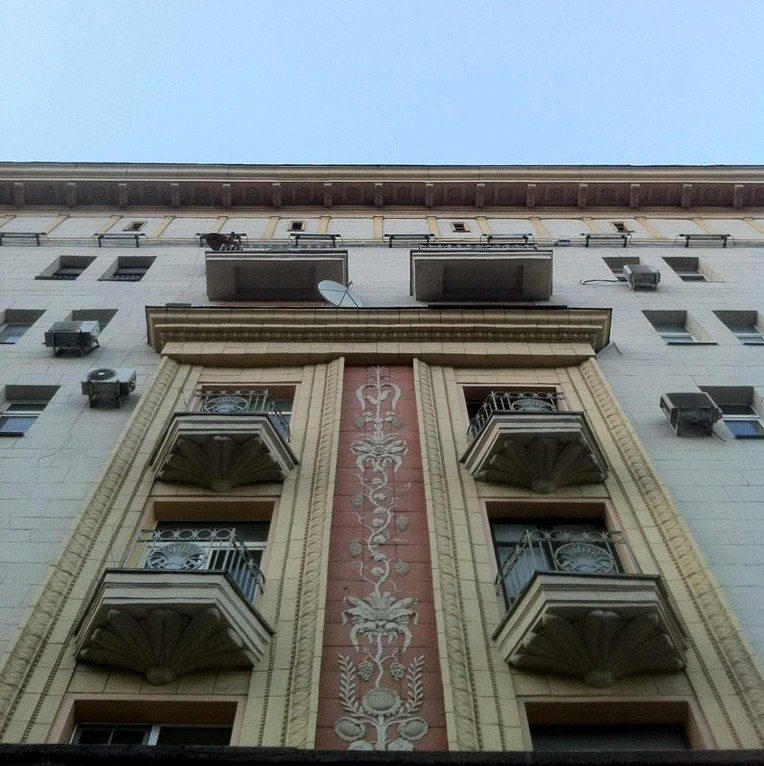 Тверская улица, дом № 4 Архитектор - А. Г. Мордвинов (1938 г.)